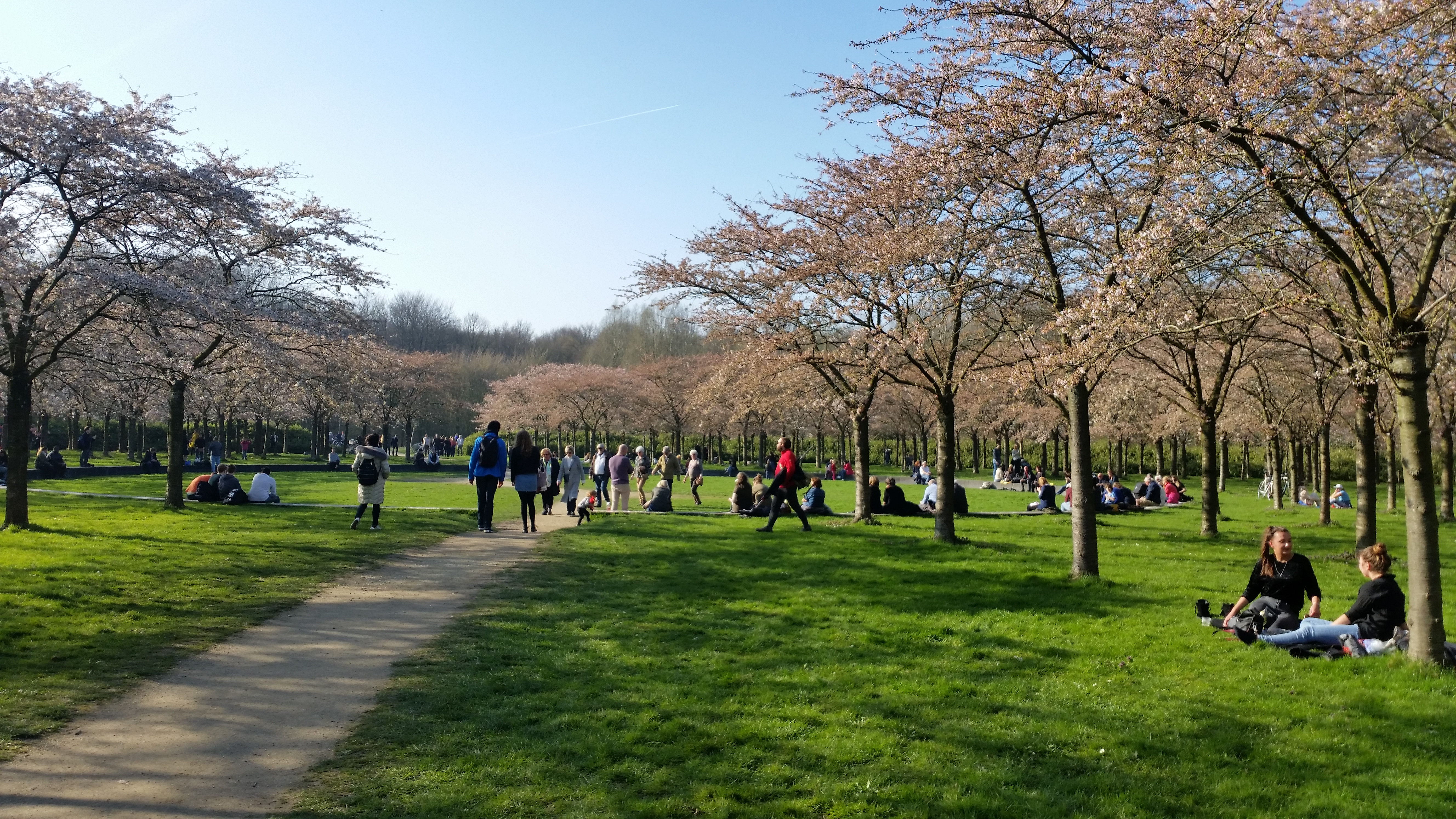 Zicht op een deel van de Japanse Kersenbomen in het Bloesempark in het Amsterdamse Bos